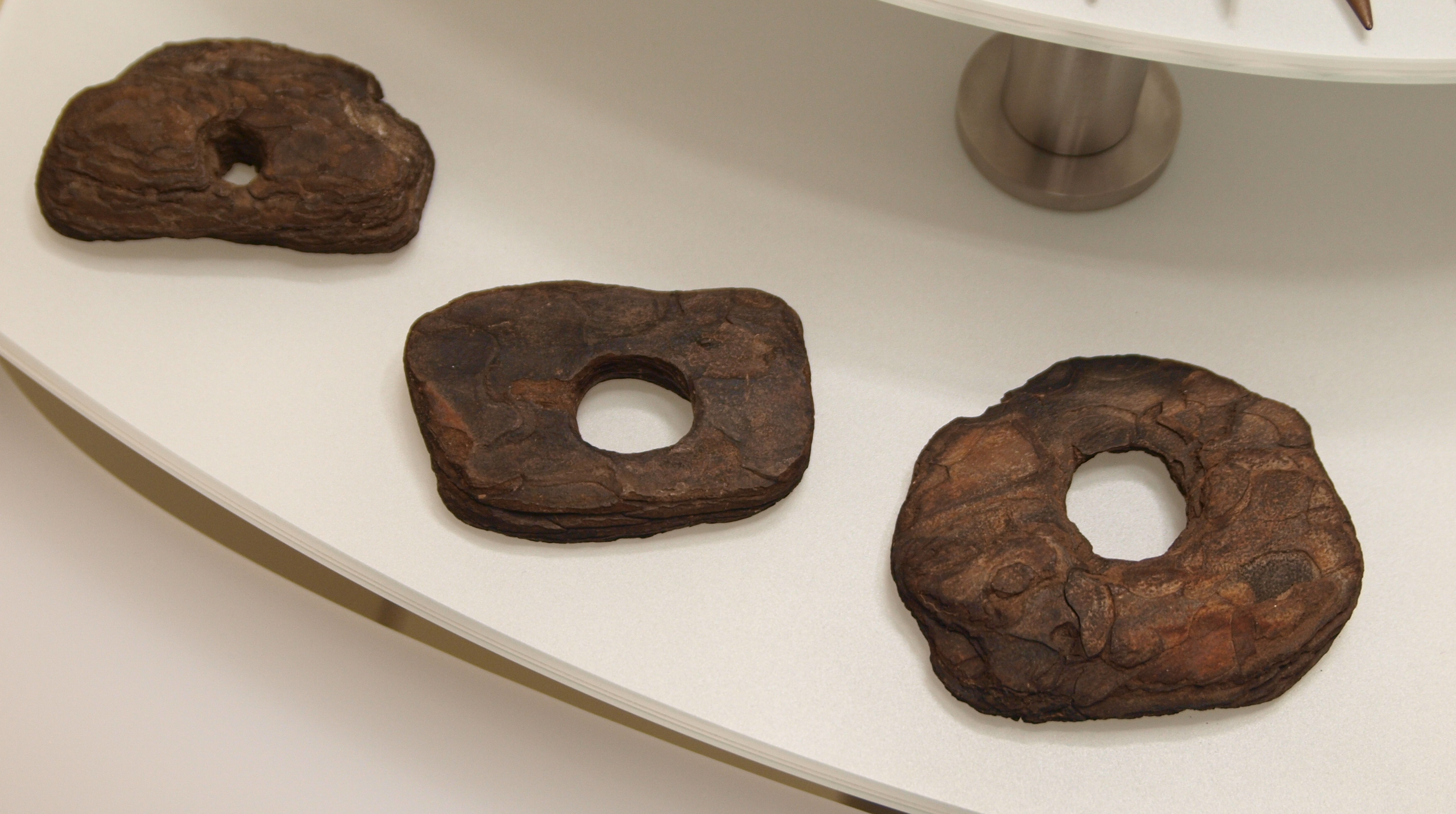 Drei Netzschwimmer aus Kiefernrinde aus Friesack, Kr. Havelland, Brandenburg. Datierung um 8000 v. Chr. Fotografiert im Archäologischen Landesmuseum Brandenburg im Paulikloster, Brandenburg an der Havel.